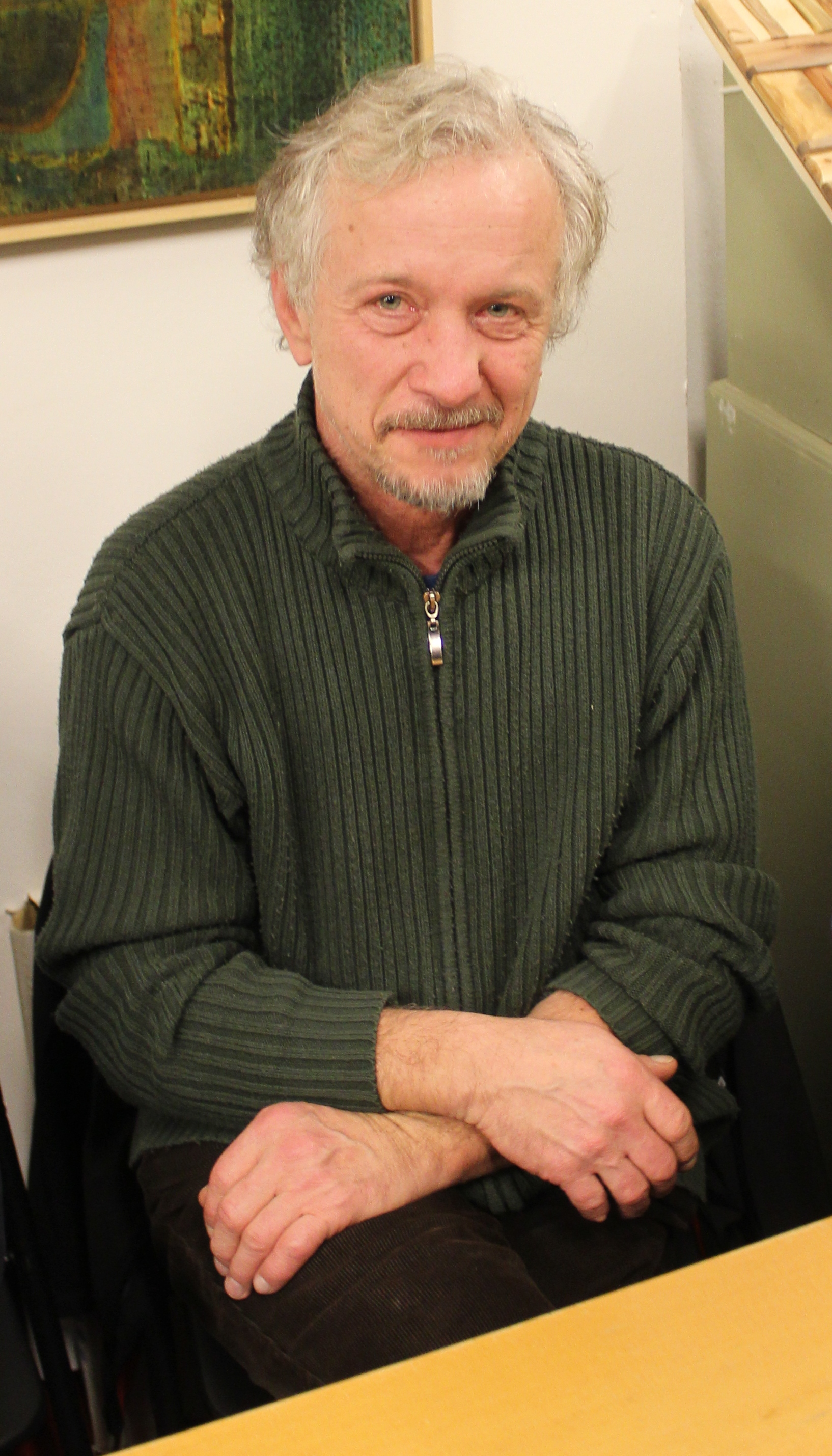 Martin Patřičný na Maxiautogramiádě konané v pražské galerii Mánesova 54 péčí Vratislava Ebra.